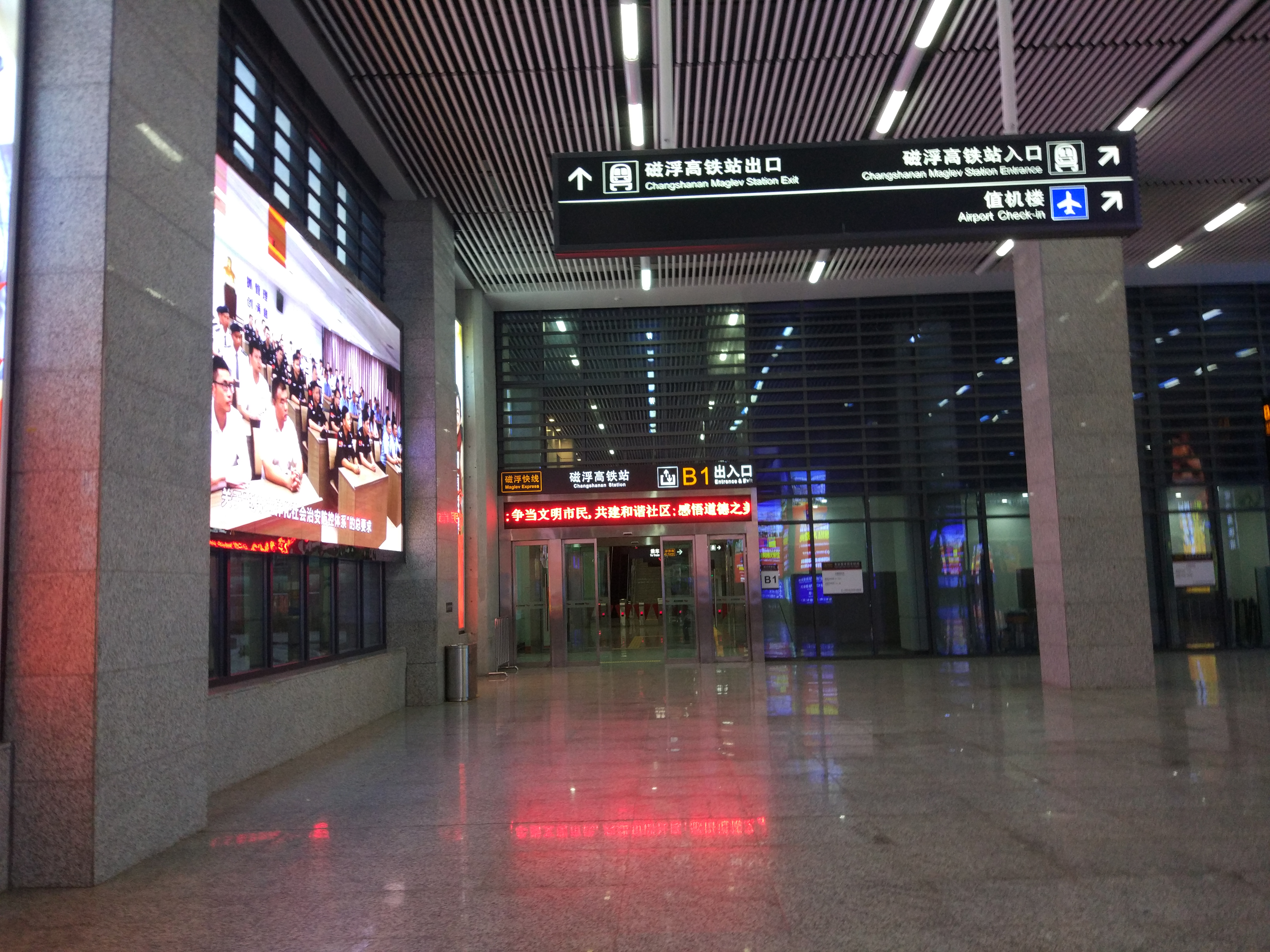 长沙磁浮机场站进出口